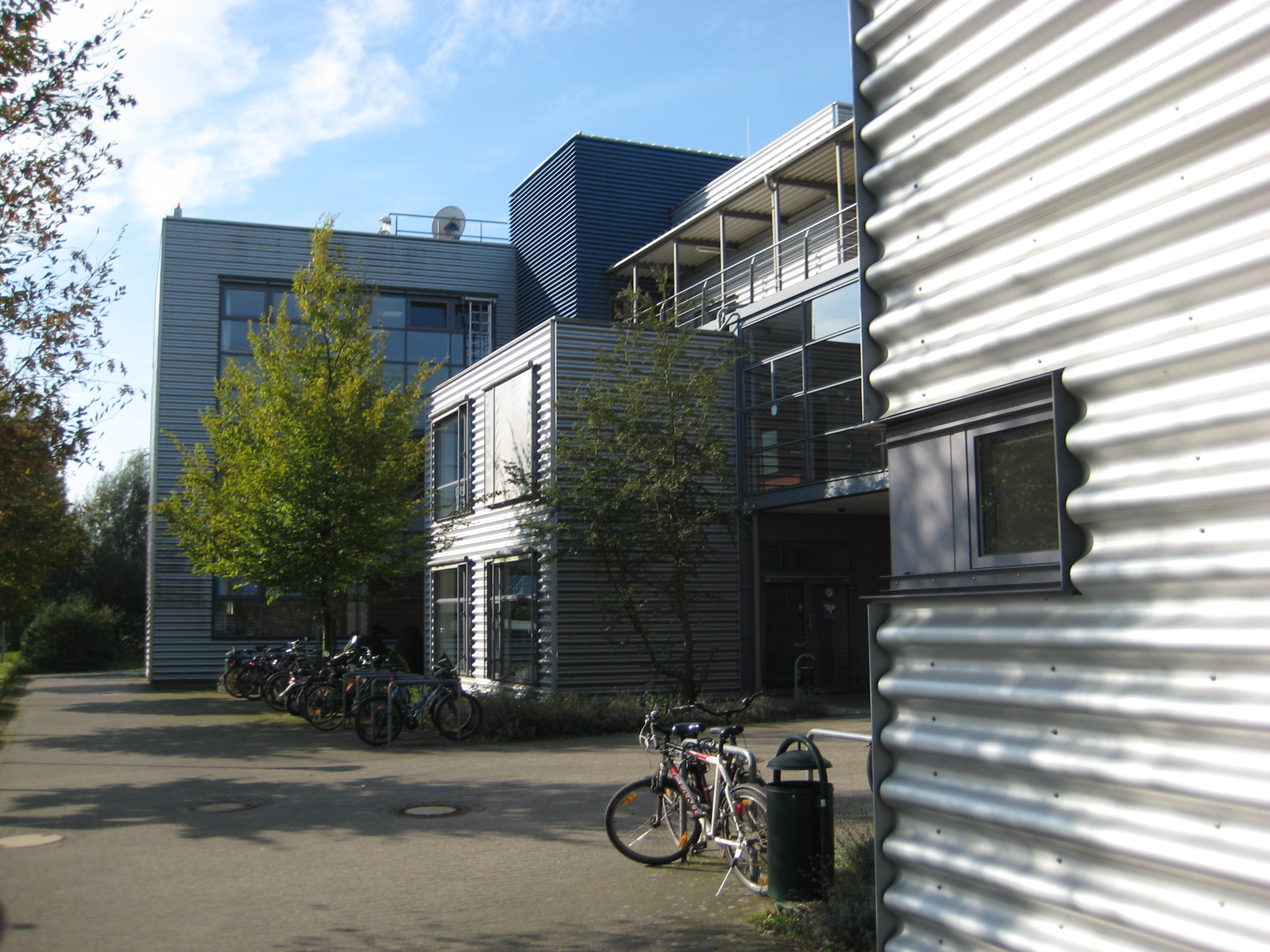 Ansicht 2 Fachhochschule Lübeck